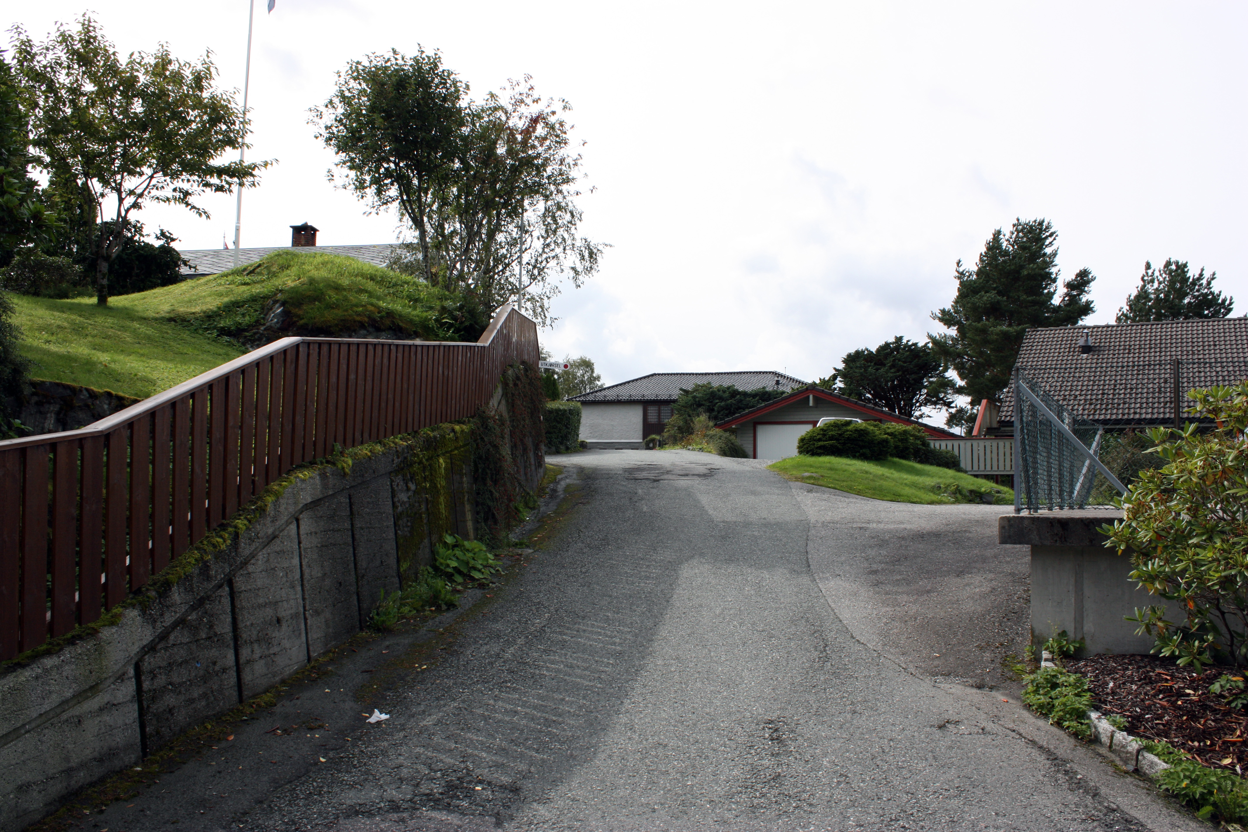 Nøttveitlia, Fana, Bergen. August 2009.